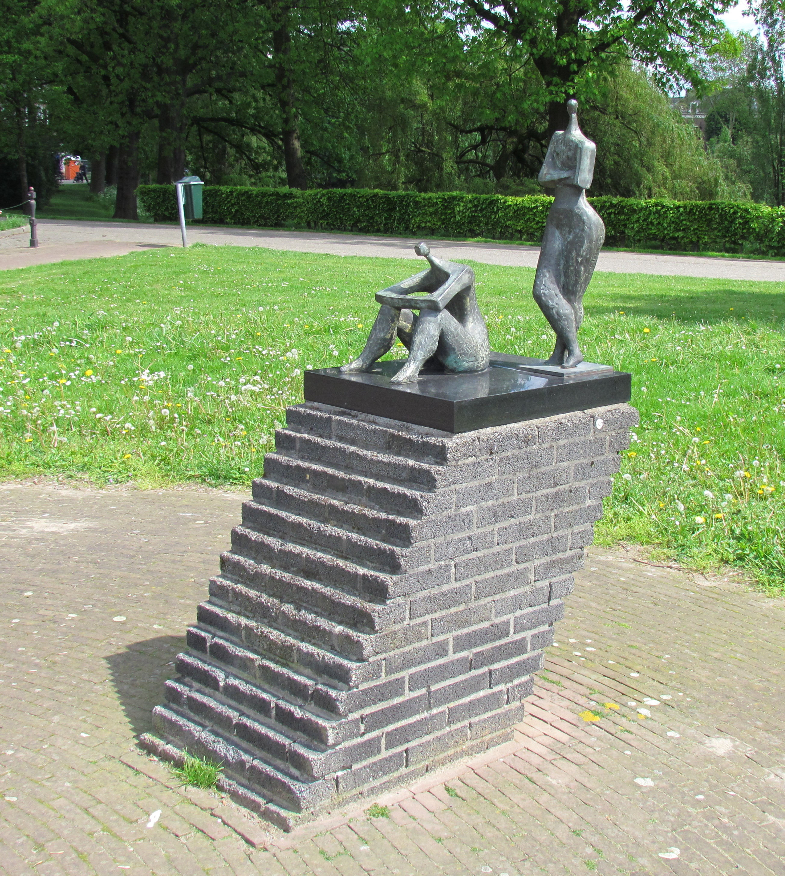 Twee vrouwen. Bronzen sculptuur van de Doesburgse beeldend kunstenaar Ad van den Brink aan de IJsselkade in Doesburg